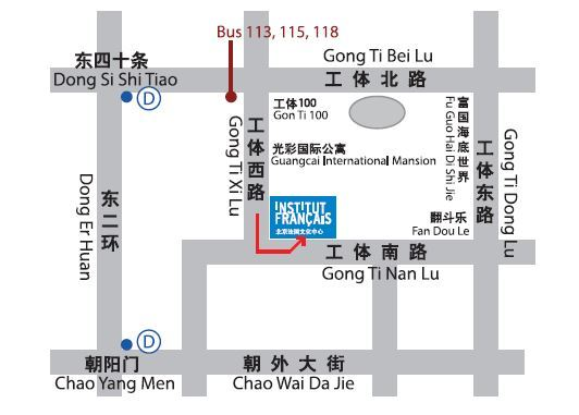 Plan d'accès à l'IF - Pékin